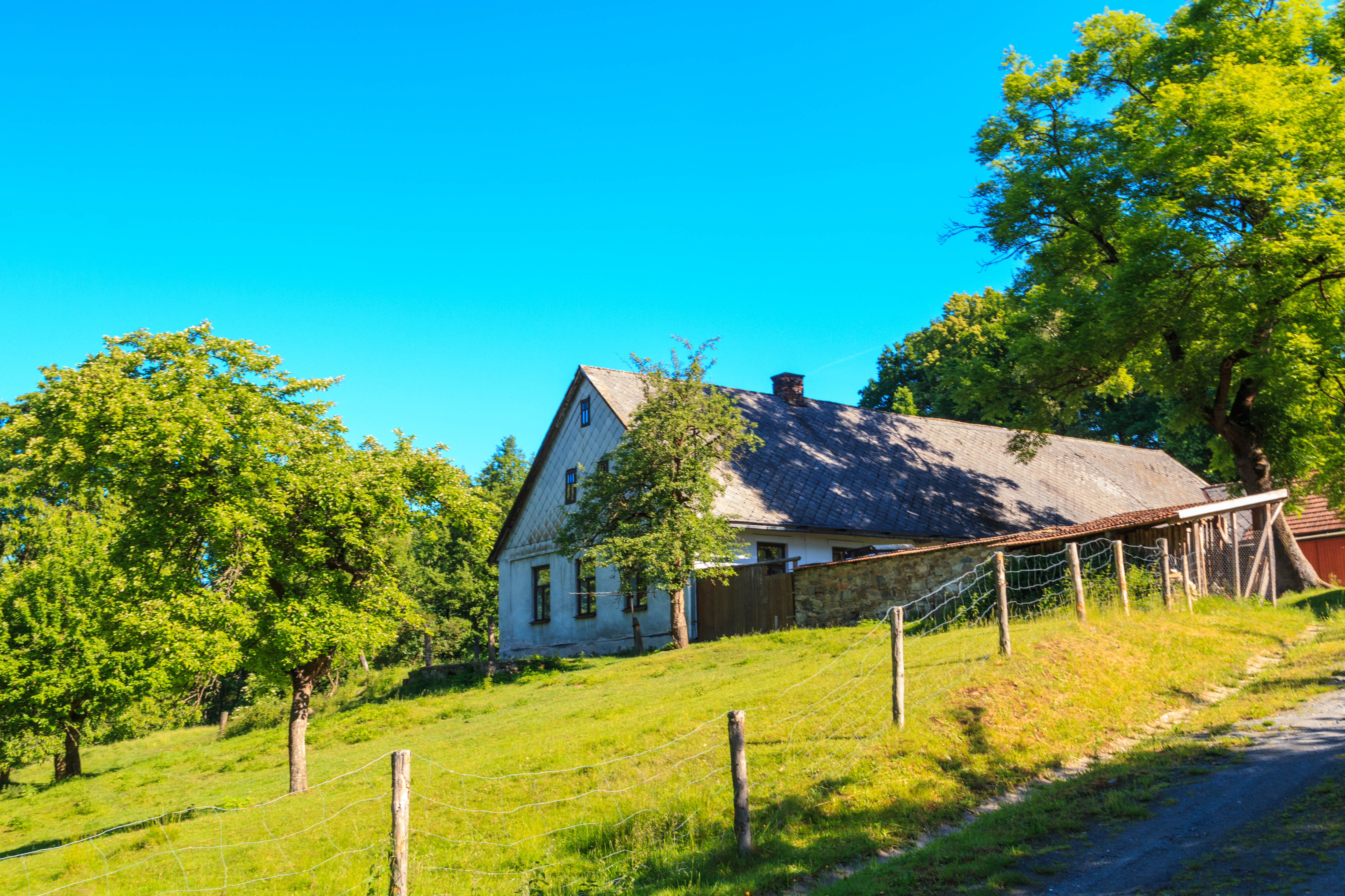 Sloupno čp. 19